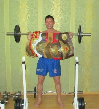 Стецуренко Александр